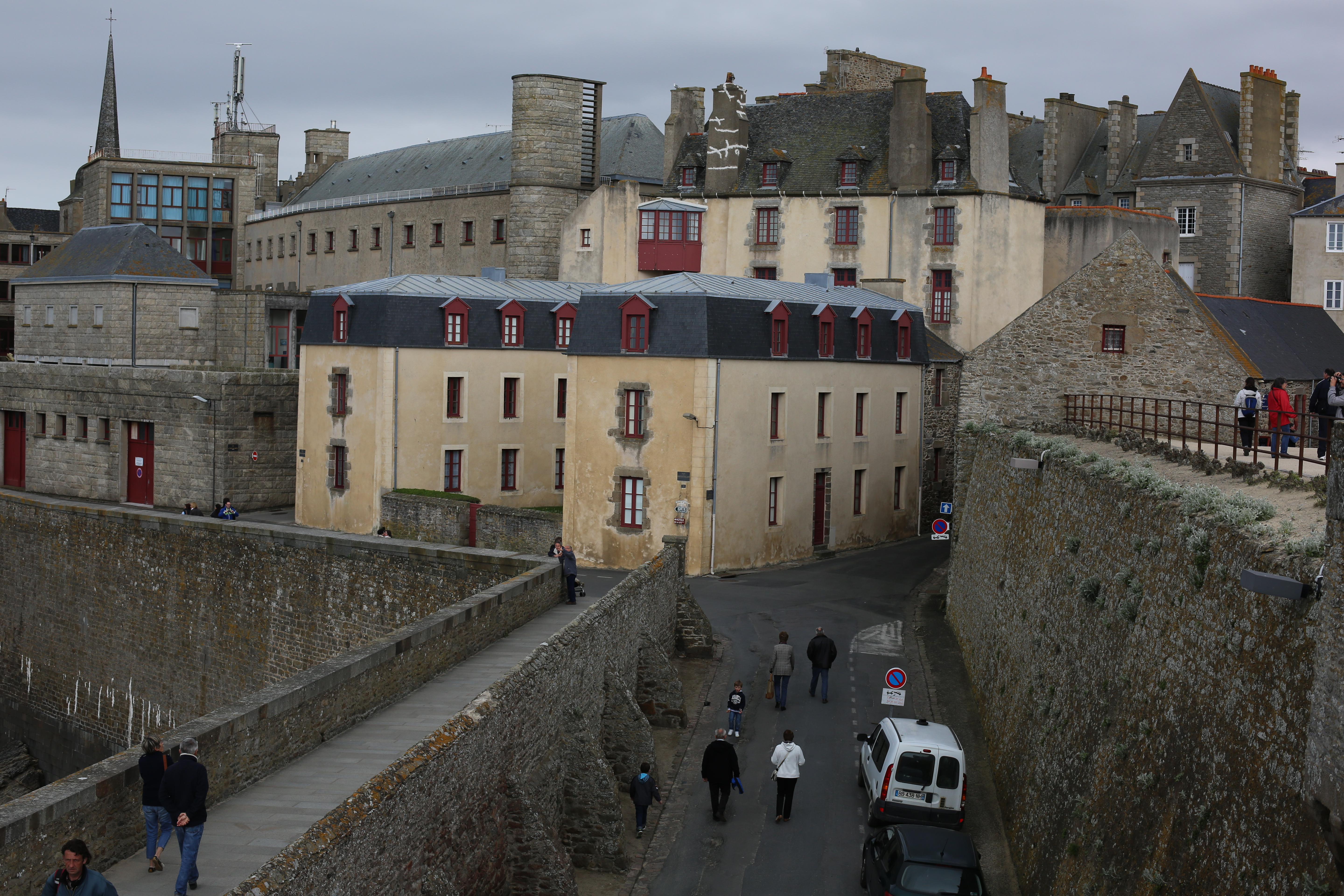 Hôtel de la Bertaudière, maison natale de Robert Surcouf : façade sur la rue du Château, vue de la tour Bidouane.